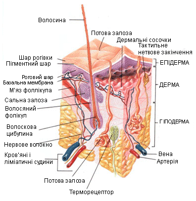 Схематичний малюнок розрізу шкіри